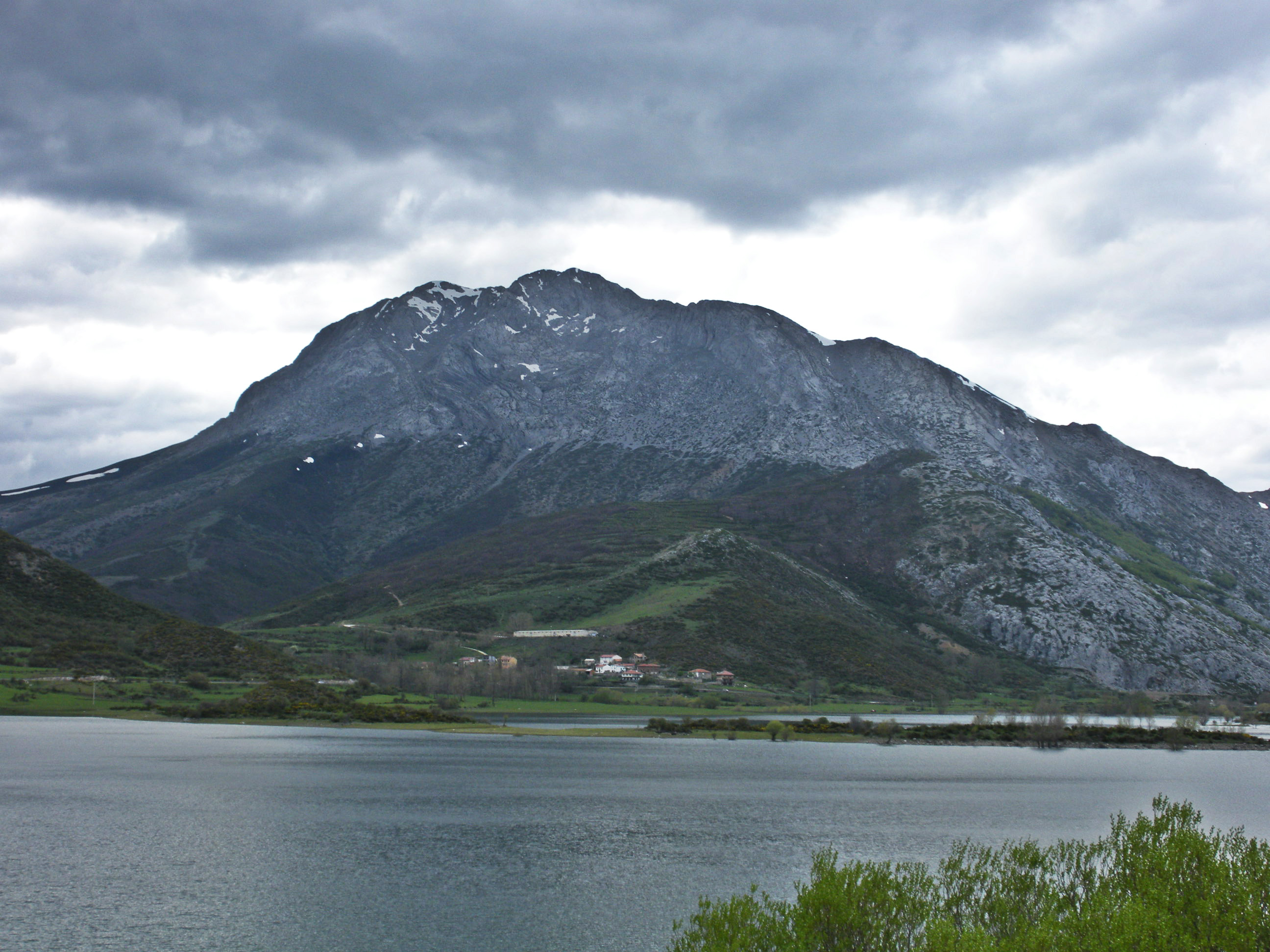 Vista del Espigüete, al norte de la provincia de Palencia, España.